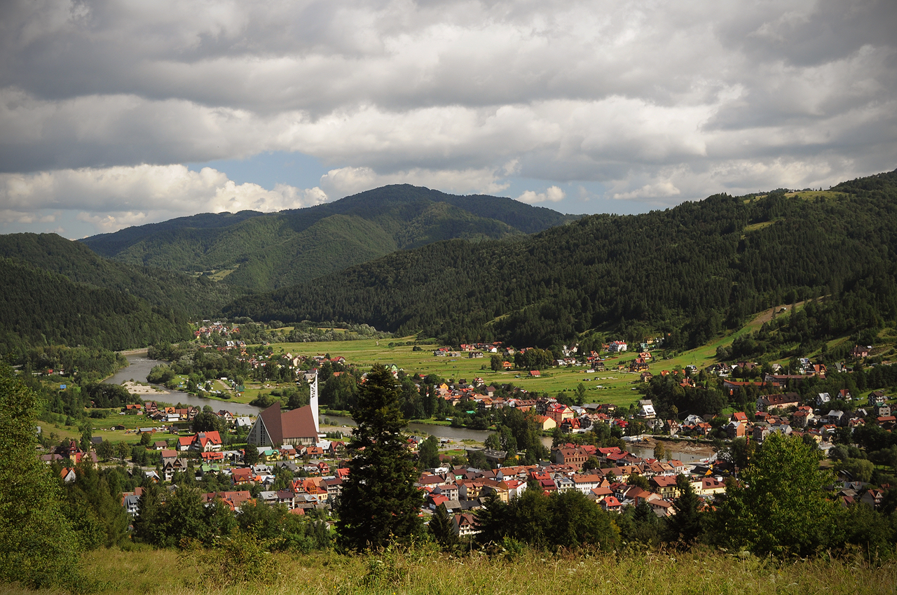 Widok na Krościenko nad Dunajcem, woj. małopolskie